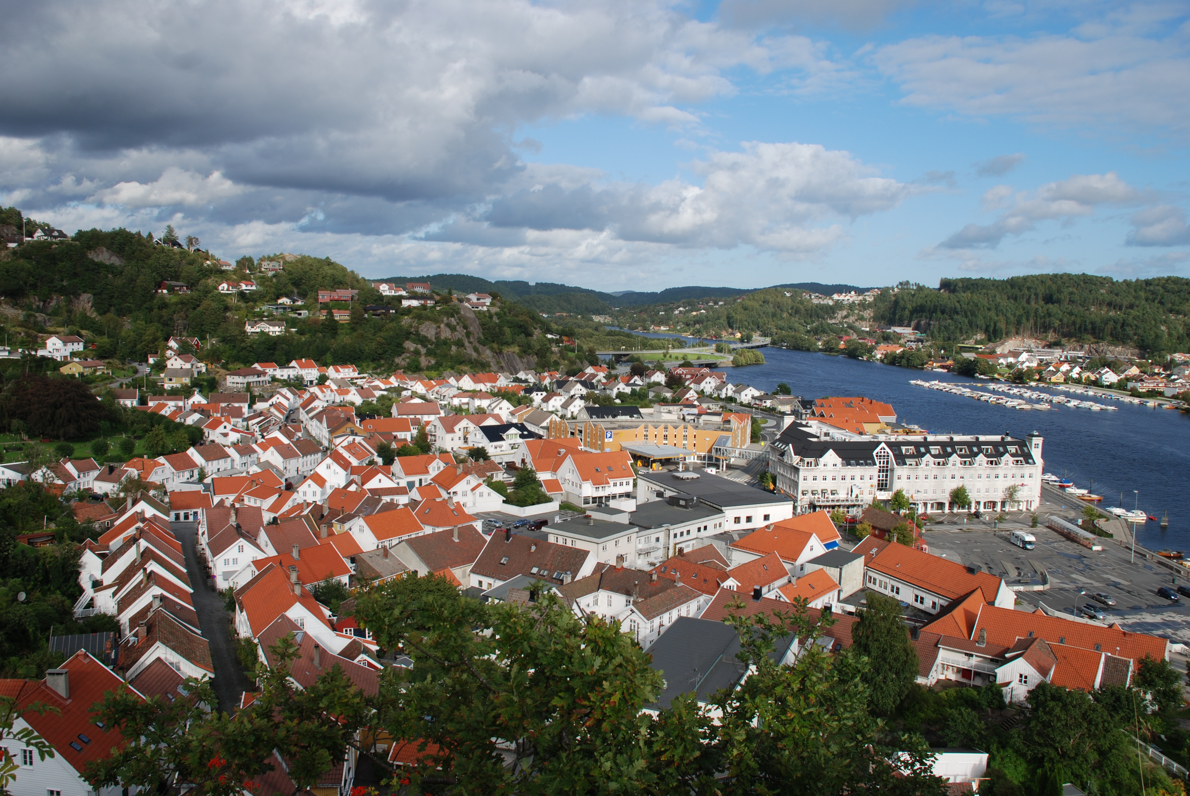 Øvrebyen